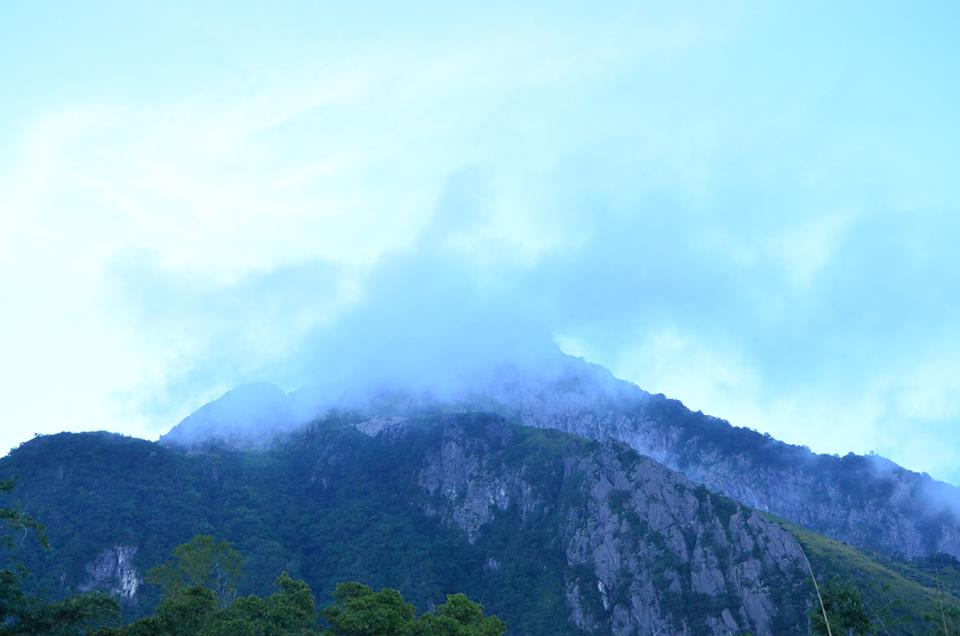 Tetun: Viqueque - Bagui, 22 Juñu 2015 – S.E. Prezidente Repúblika, Taur Matan Ruak, Primeira Dama, Sra. Isabel da Costa Ferreira, no familia sira foto hamutuk iha uma Knua Kaiwalita.